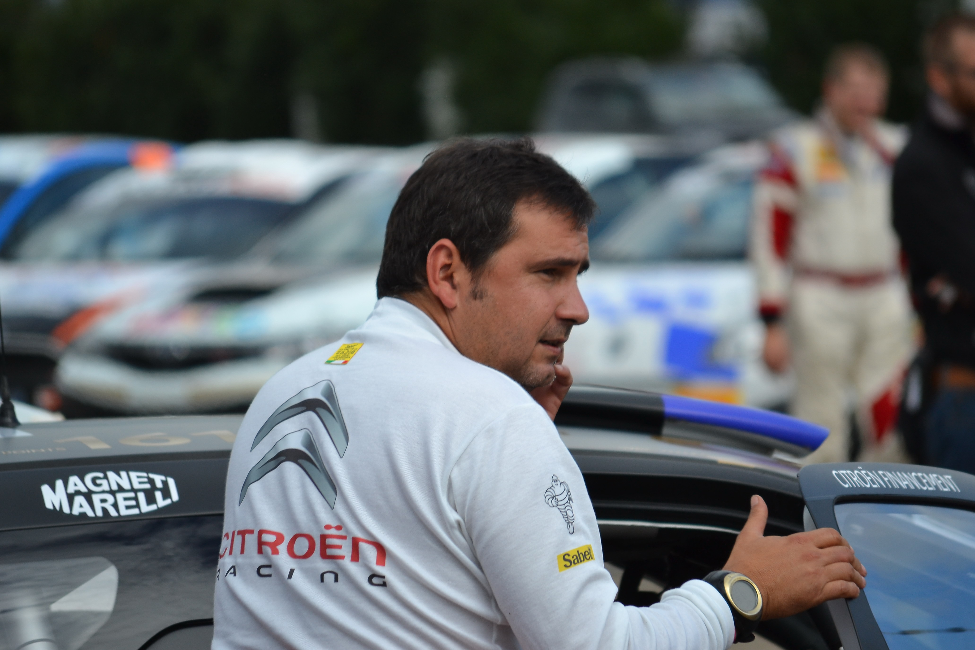 Daniel Elena, le copilote de Sébastien Loeb, au parc d'assistance de Colmar durant le Rallye de France-Alsace 2013.